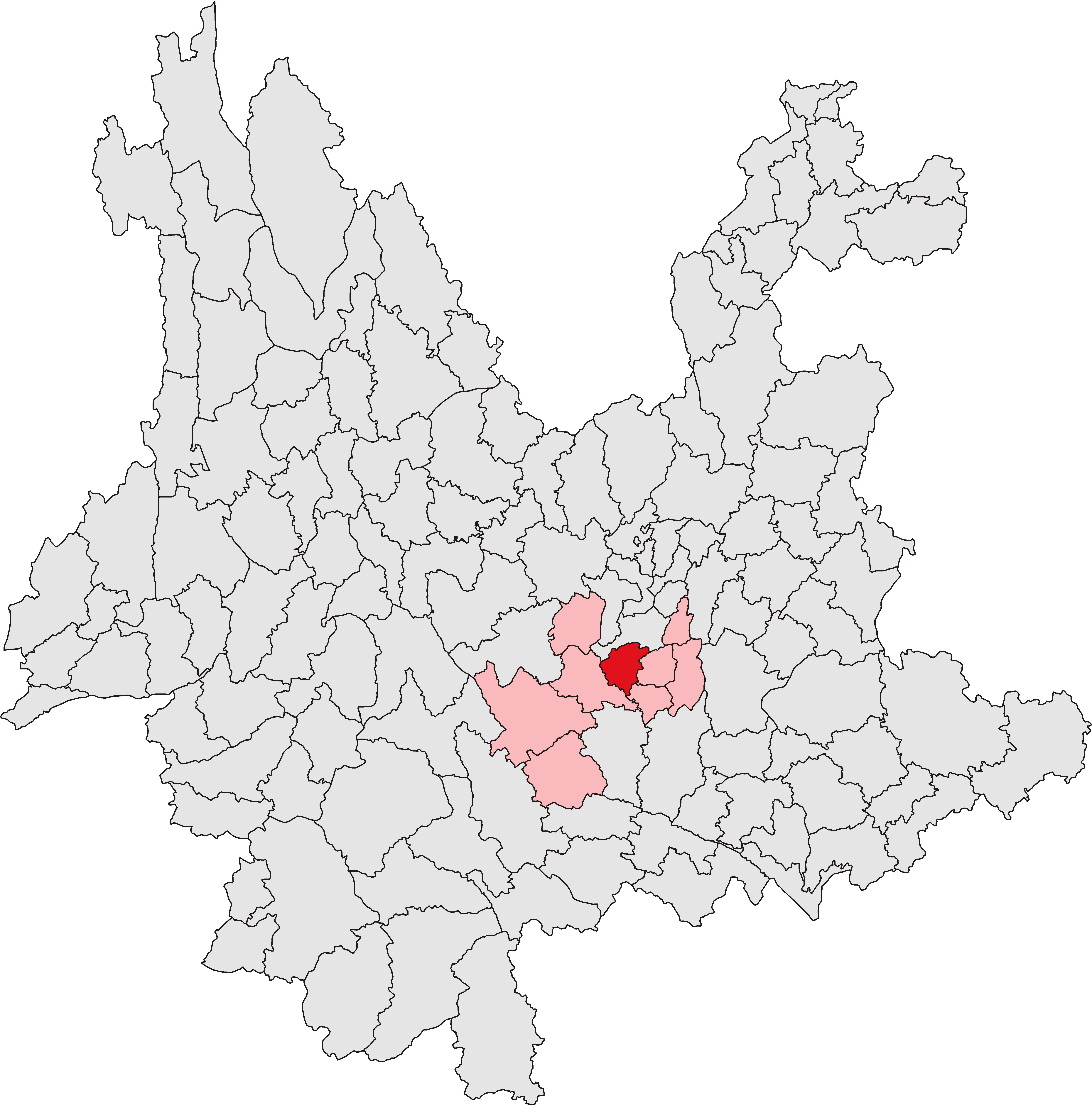 红塔区位置图